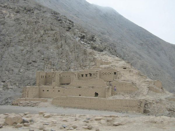 Sitio arqueologico de Uquira en distrito de Coayllo, Cañete, Lima, Perú.